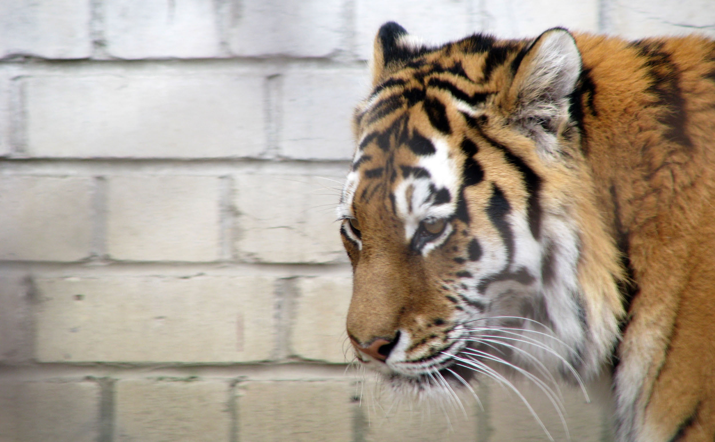 Zoo